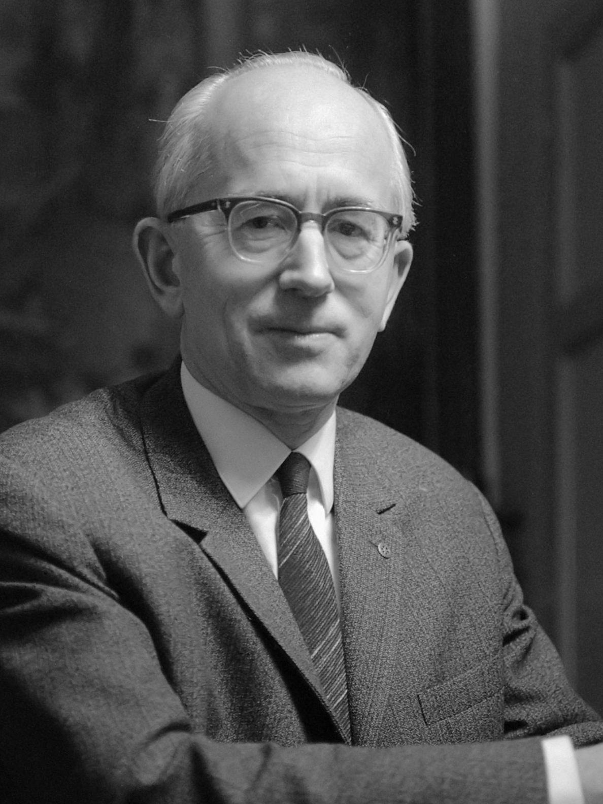 Ds. H.J. Kater (kop) zal kerkelijk huwelijk Beatrix en Claus inzegenen 20 december 1965